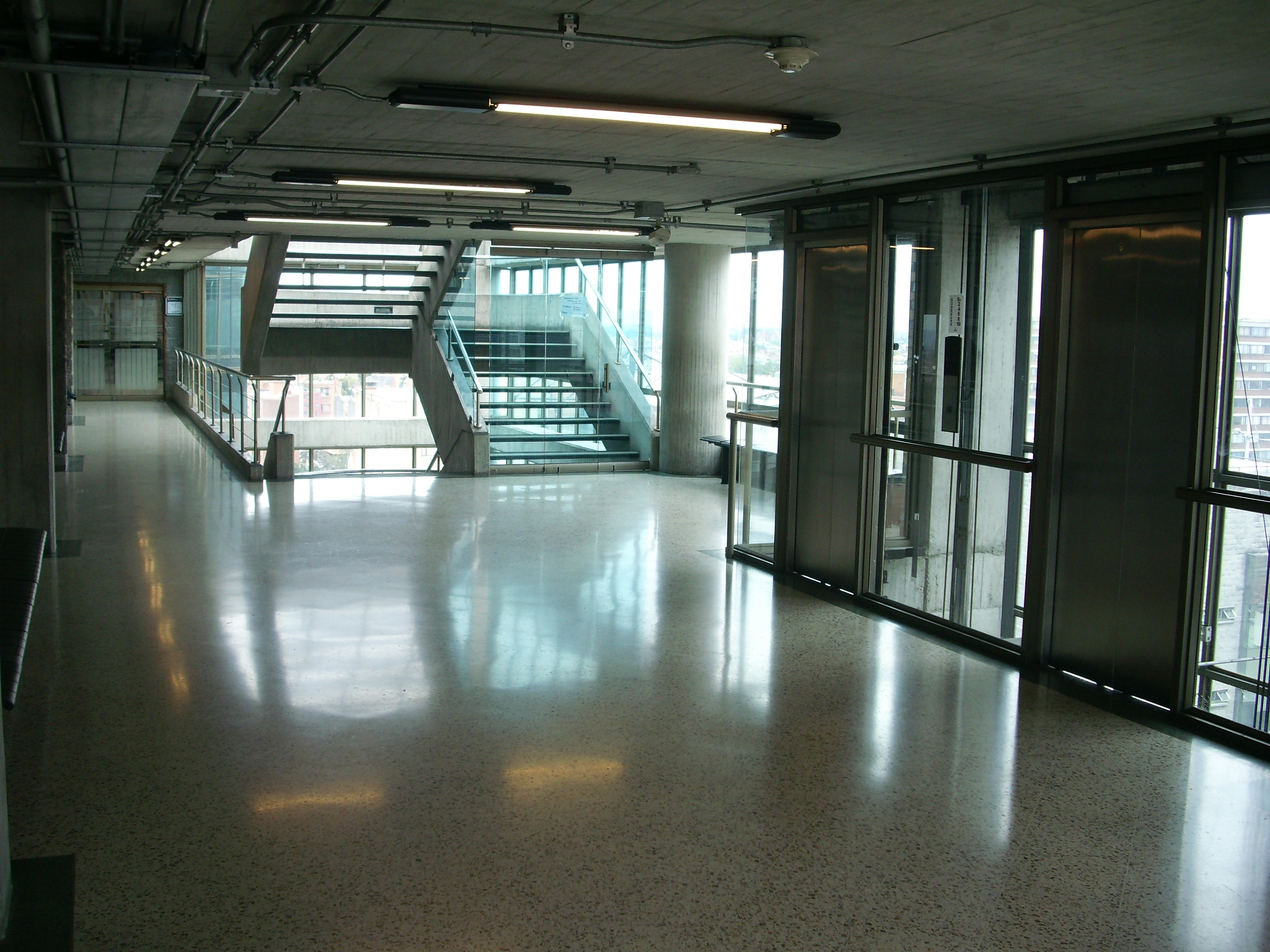 pasillo CORRESPONDIENTE al edificio Fundadores de la Universidad Piloto de Colombia